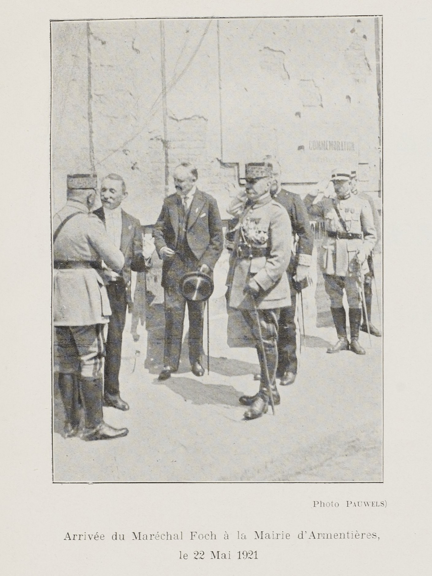 Le Maréchal Ferdinand Foch est accueilli à la Mairie provisoire de la Ville d'Armentières par les autorités civiles et militaires, dont le Maire Charles Conem.